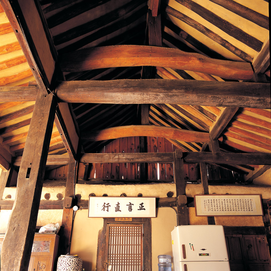 보물 제450호 안동 의성김씨 종택 (安東 義城金氏 宗宅)